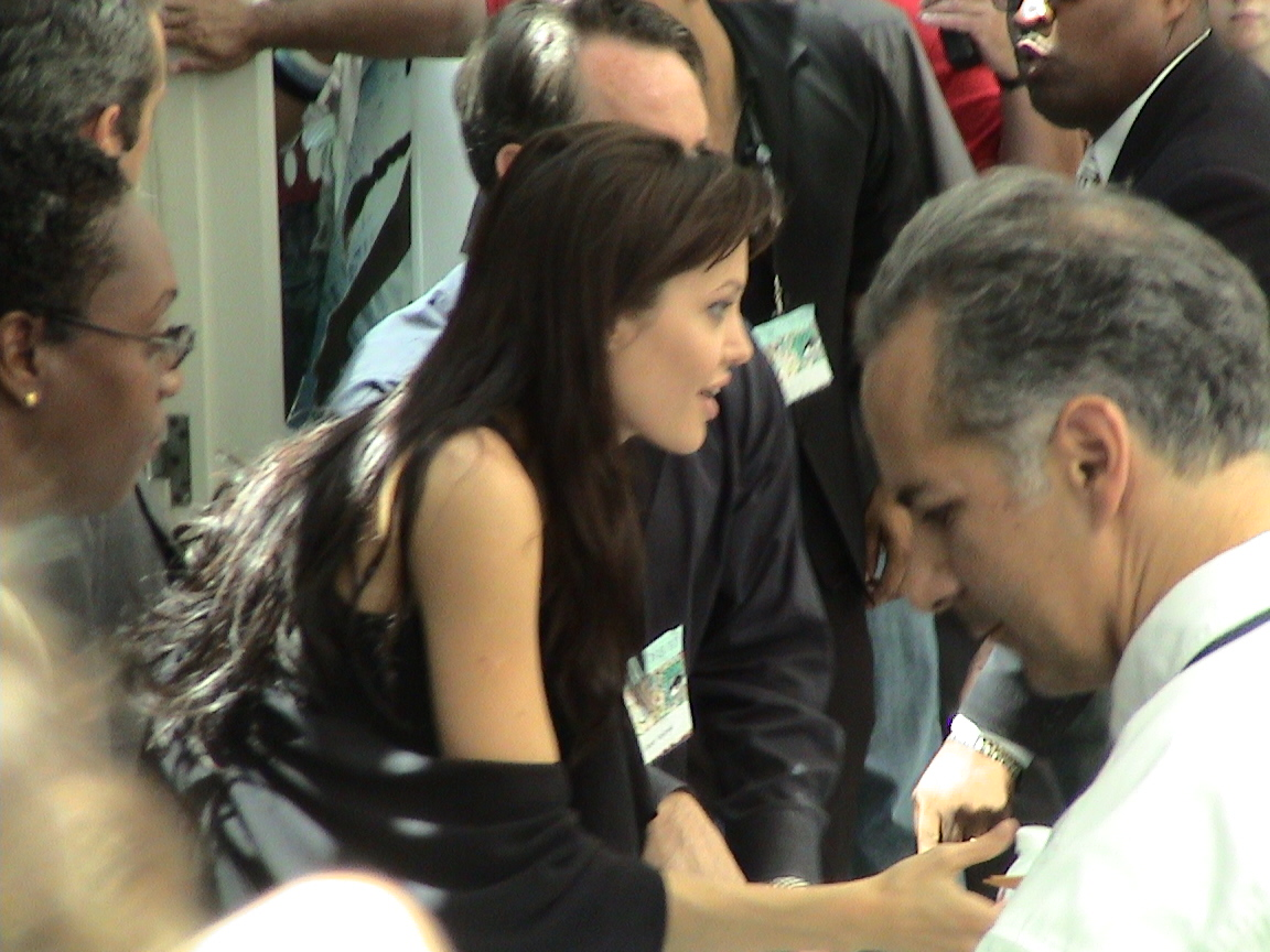 Angelina Jolie at ComicCon in San Diego, CA